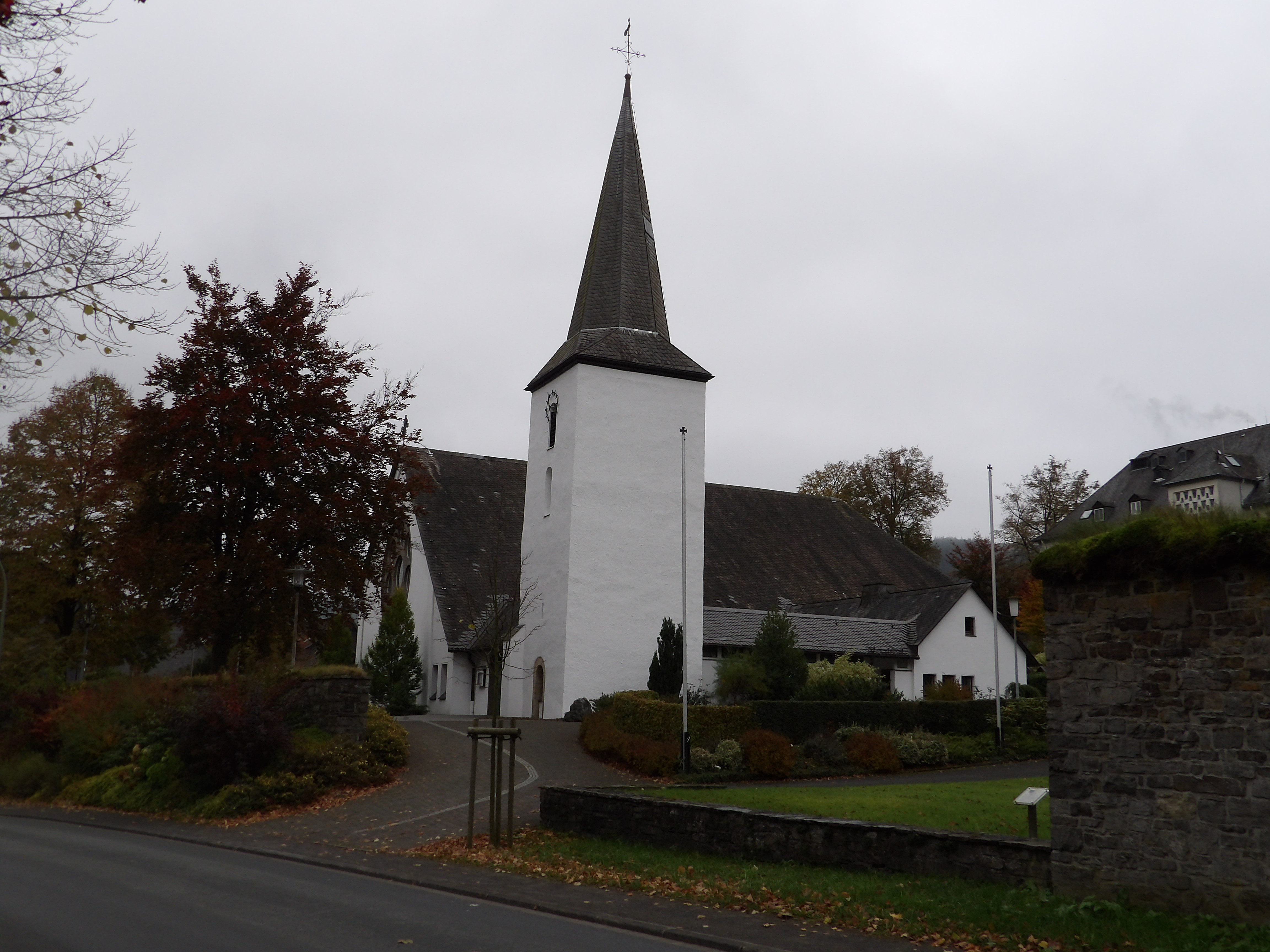 Kath. Pfarrkriche St. Georg Schmallenberg-Grafschaft, Baujahr 1963/1964